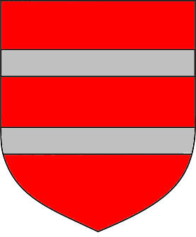 Le blason des Pantulf au XIIe siècle, de gueules à deux faces d’argent, pour les branches anglaise et normande. Des ajouts (croissants entre autres) ainsi que des brisures ont été introduits au cours des siècles.